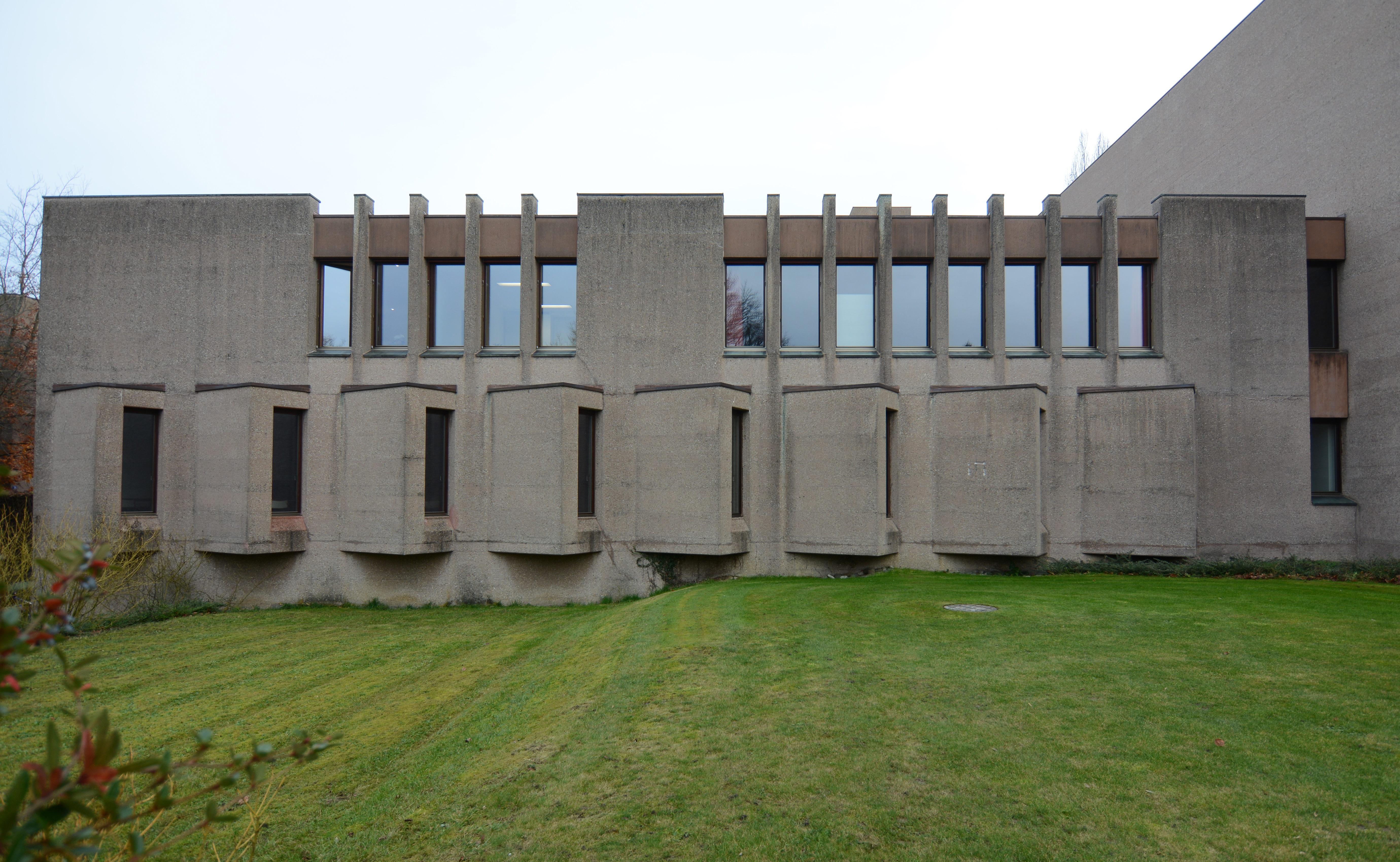 Kantonales Lehrerseminar Kreuzlingen (heute Pädagogische Maturitätsschule Kreuzlingen), Kreuzlingen, 1965–72. Aulatrakt, Übungsräume, Musiktheorie. Architekten: Rudolf und Esther Guyer